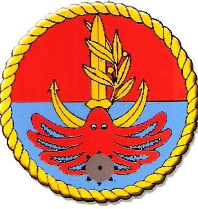 סמל היחידה לעבודות תת מימיות בחיל הים